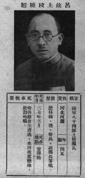 中文（台灣）: 抗戰軍人忠烈錄第一輯中的烈士遺像